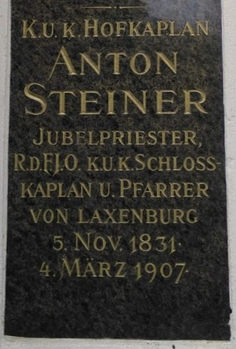 Wiener Zentralfriedhof: Grabinschrift für den k.u.k. Hofgeistlichen Anton Steiner, Ritter des Franz-Josephs-Ordens, auf dem Grabdenkmal für die Familie des k.u.k. Hofrates Johann Steiner